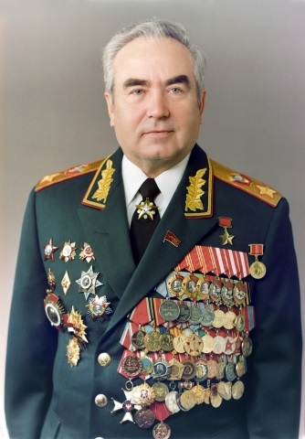 Официальный парадный портрет Маршала Советского Союза Виктора Георгиевича Куликова